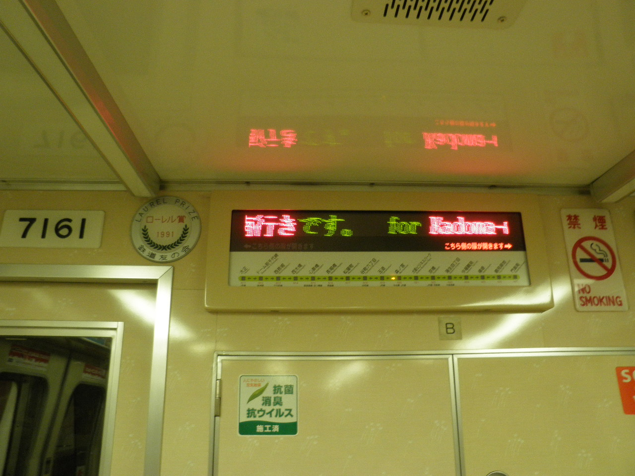 リニューアル車の車内案内表示器とローレル賞受賞プレート